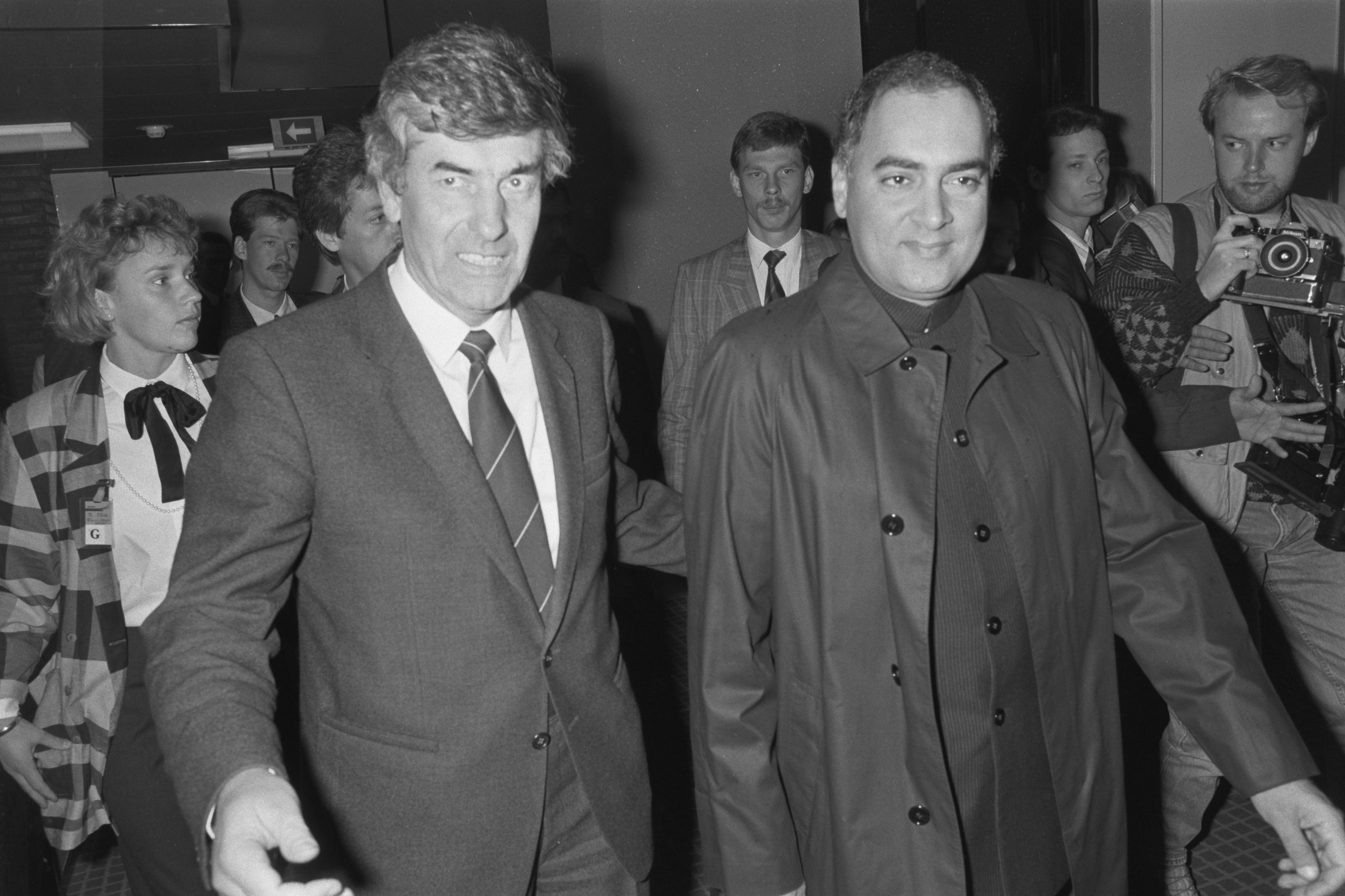 Collectie / Archief : Fotocollectie Anefo Reportage / Serie : [ onbekend ] Beschrijving : Lubbers en premier Gandhi op Schiphol Datum : 21 oktober 1987 Locatie : Noord-Holland, Schiphol Trefwoorden : aankomsten, premiers Fotograaf : Molendijk, Bart / Anefo